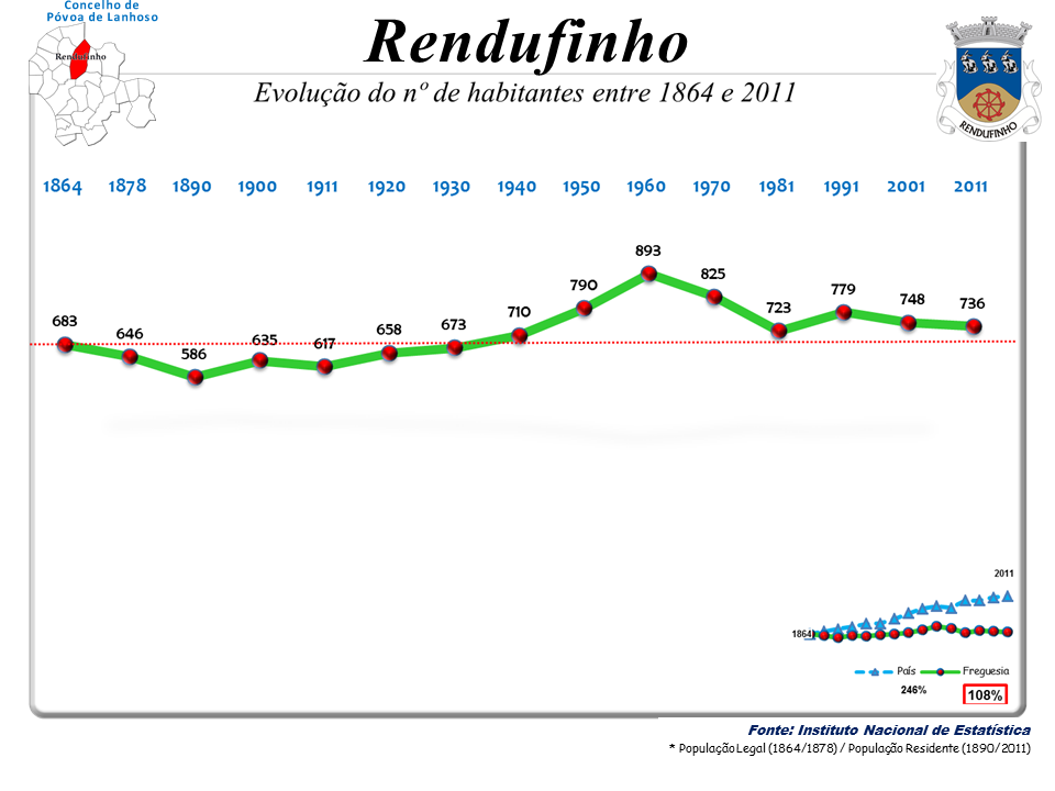 Censos 1864/2011